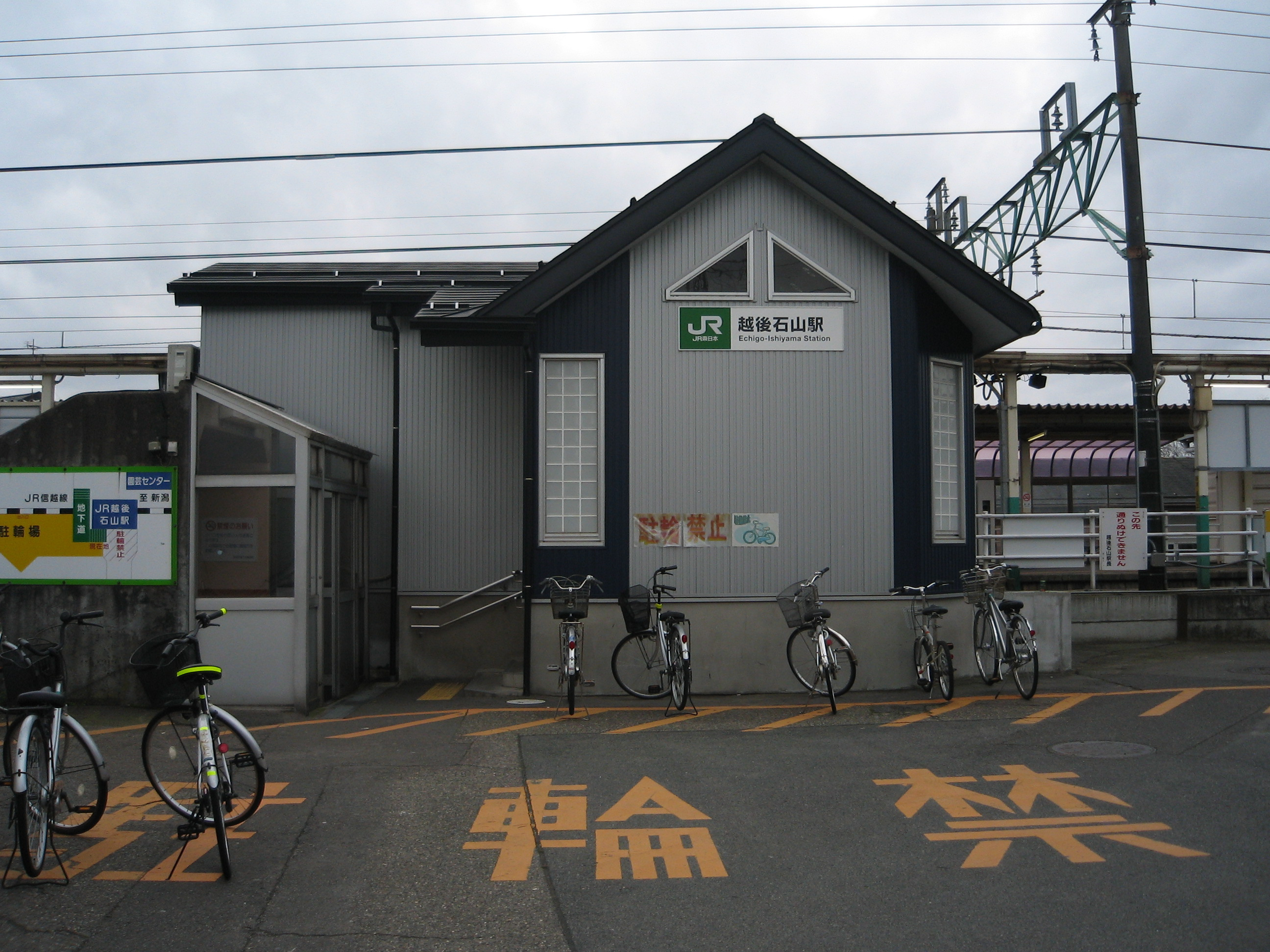 JR東日本 越後石山駅